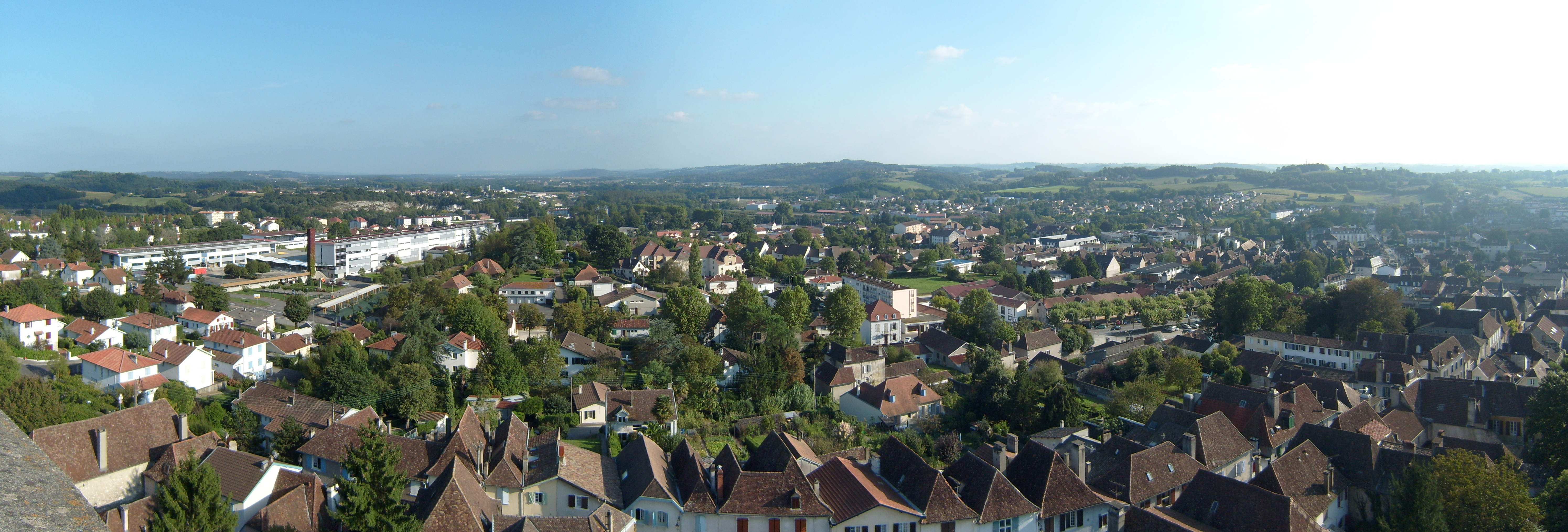 Panorama du centre ville d'Orthez depuis la Tour Moncade